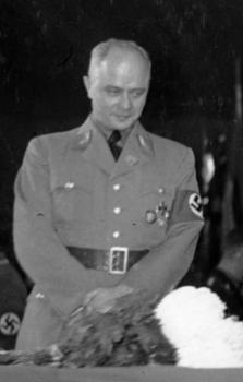 Feiern zum 10-jährigen Bestehen des Gaues Berlin 10 Jahre Gau Berlin Die Feierlichkeiten zum 10jährigen Bestehen des Gaues Berlin erreichten mit der Kundgebung im Sportpalast am Freitagabend [30.10.36] ihren Höhepunkt. Von brausendem Jubel immer wieder unterbrochen, schilderte Dr. Goebbels, der Eroberer Berlins rückblickend noch einmal den Kampf um die Reichshauptstadt. Grossen Jubel löste die überraschende Ankunft des Führers aus, der zu der Alten Garde sprach. Eine Gruppe während der Sportpalast-Kundgebung von links nach rechts: Der stellvertretende Gauleiter Staatsrat Görlitzer, Dr. Goebbels, der Führer, Reichsleiter Bouhler, zwischen ihnen der Kommandeur der Leibstandarte Adolf Hitler, Sepp Dietrich. Scherl Bilderdienst, Berlin 31.10.1936 15484-36 Abgebildete Personen: Görlitzer, Artur: Stellvertretender Gauleiter von Berlin, Staatsrat, MdR, Deutschland (GND 128025263) Goebbels, Joseph: Reichsminister für Volksaufklärung und Propaganda, Gauleiter Berlin, Deutschland Hitler, Adolf: Reichskanzler, Deutschland Dietrich, Joseph (Sepp): Generaloberst, Ritterkreuz (RK), SS-Oberst-Gruppenführer, Leibstandarte, Deutschland (GND 11888932X)